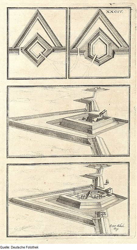 Original image description from the Deutsche Fotothek Architektur & Geometrie & Festungsbau & Befestigung & Schanze